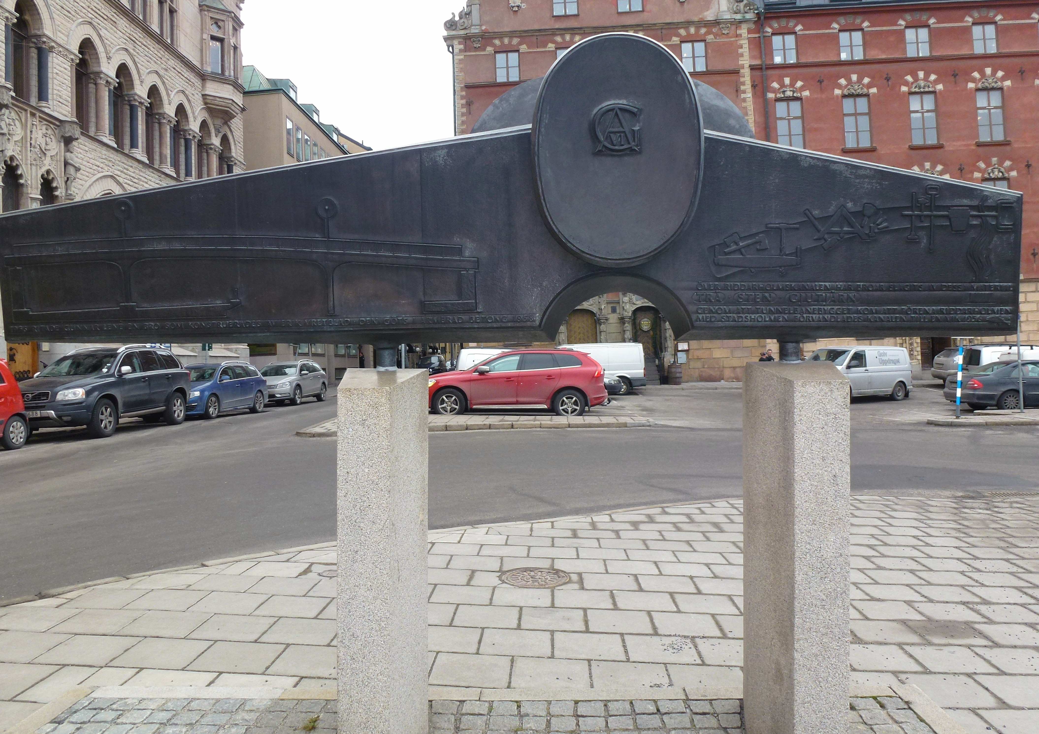 Riddarholmsbroarna av Bengt Inge Lundkvist från 1981 (baksida)